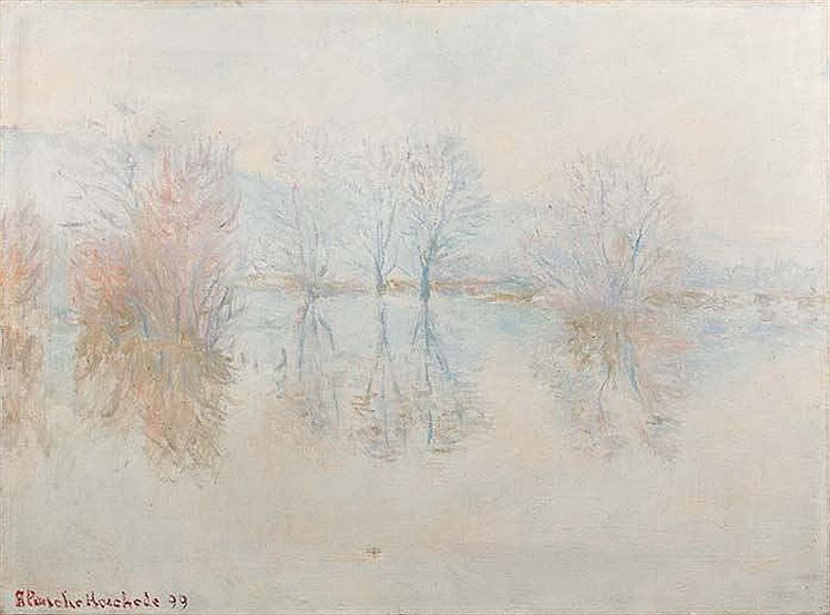 Бланш Моне, 1899